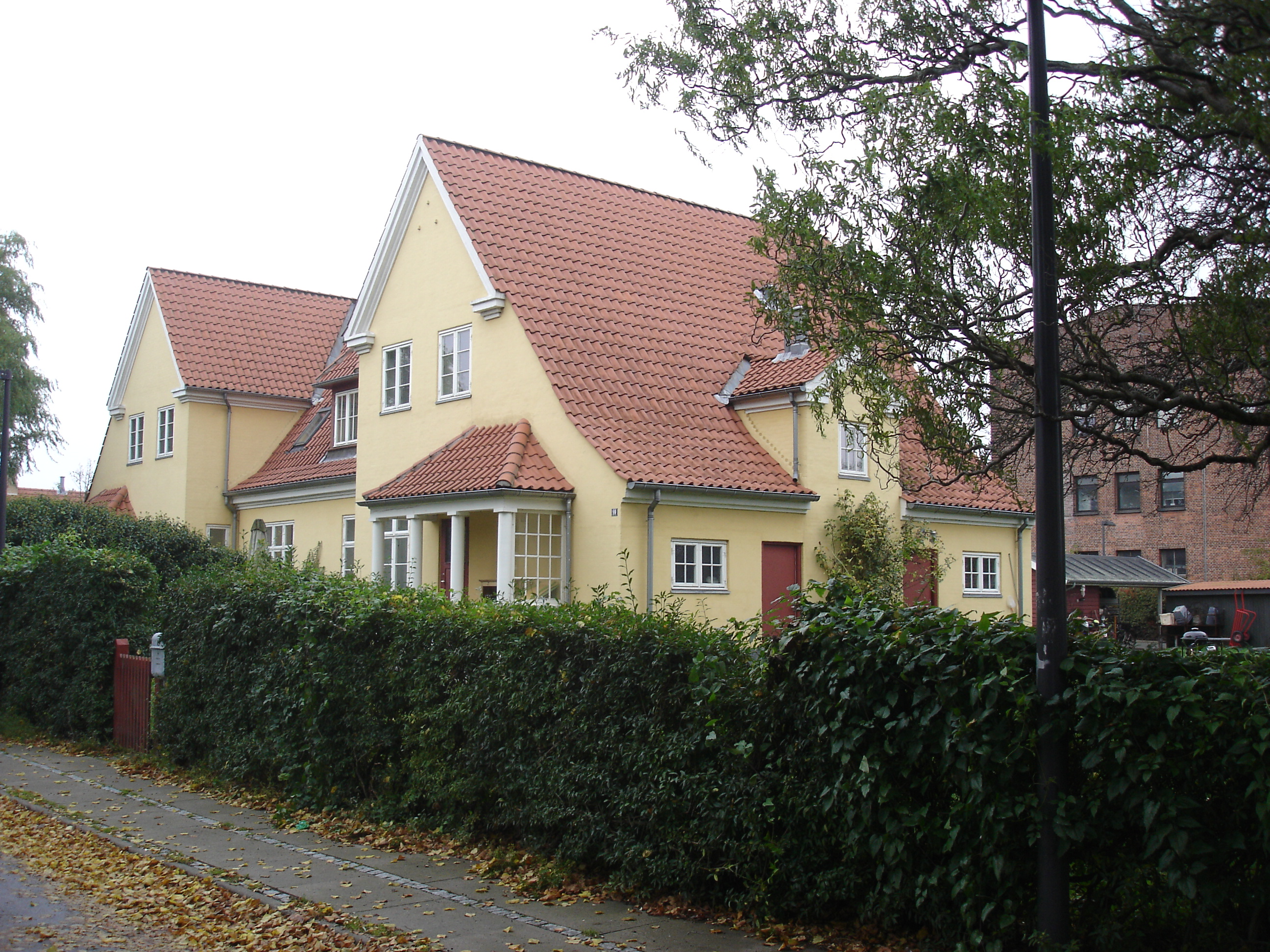 Den Gule By på Otto Busses Vej, set fra Ø